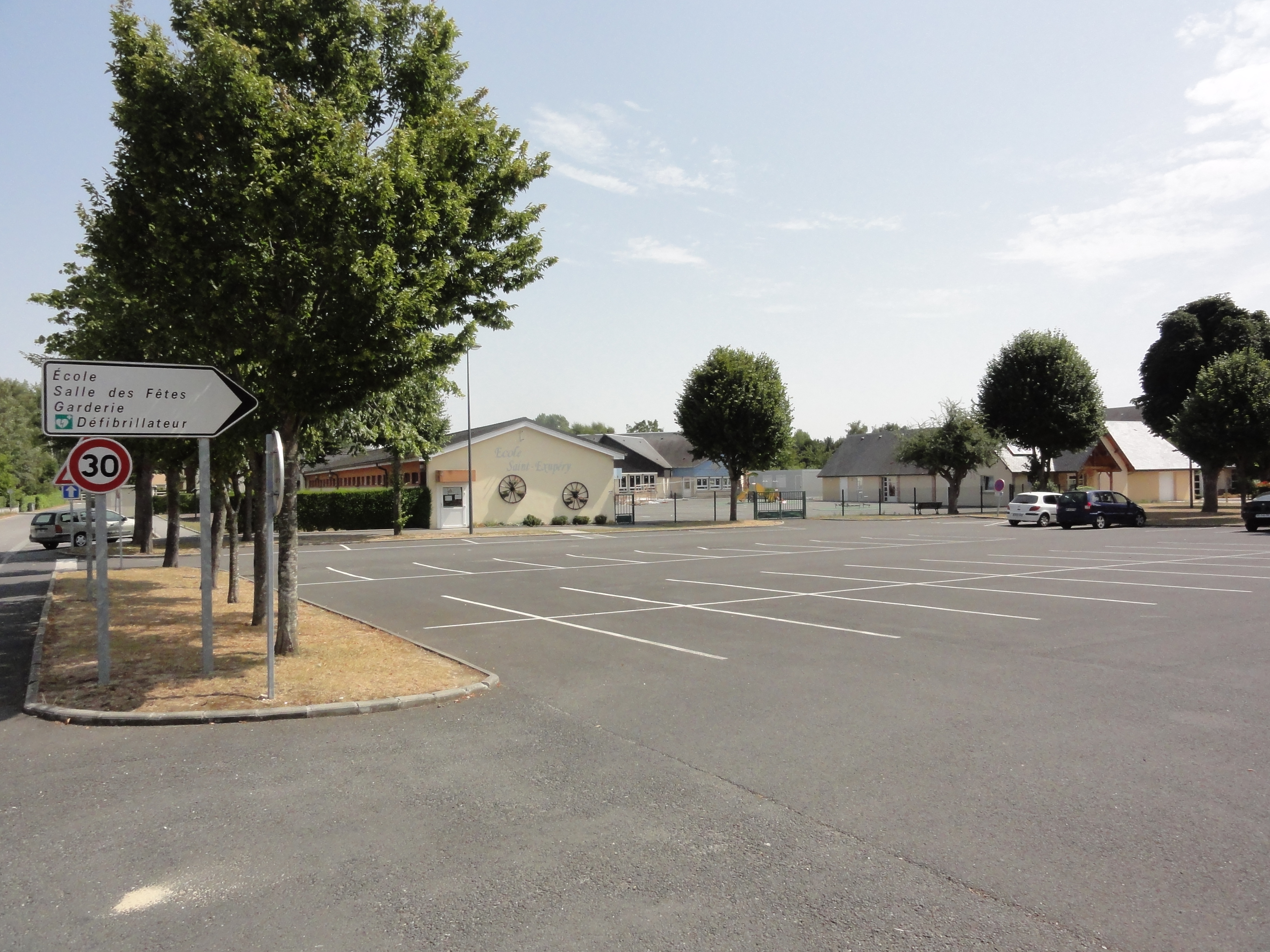 Petiville (Seine-Mar.) école